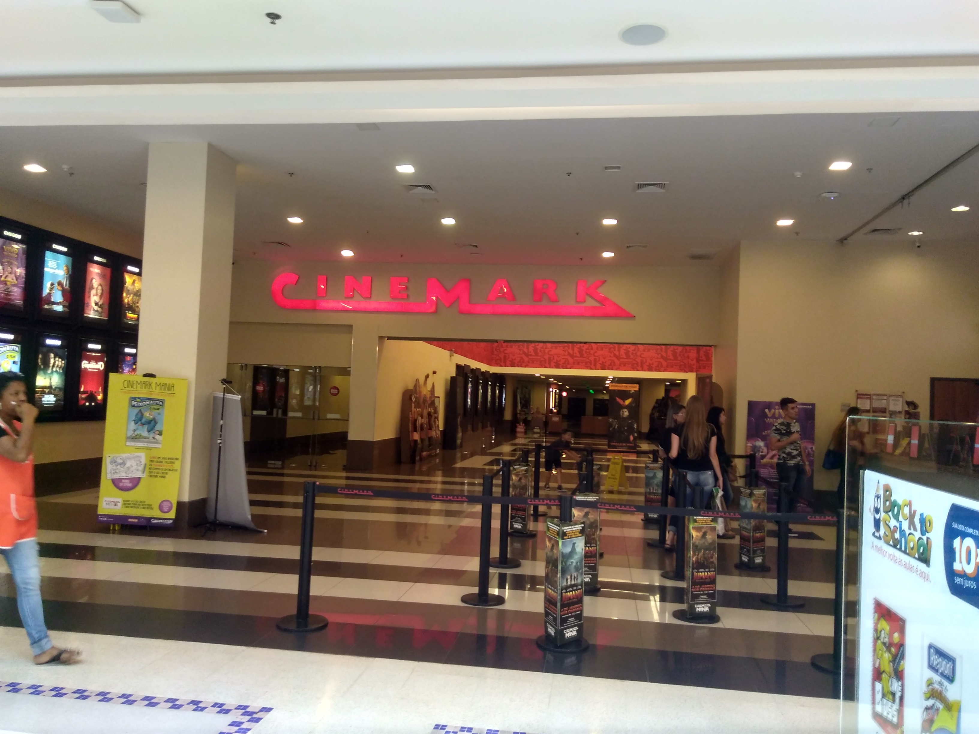 Entrada do Cinemark Canoas Shopping